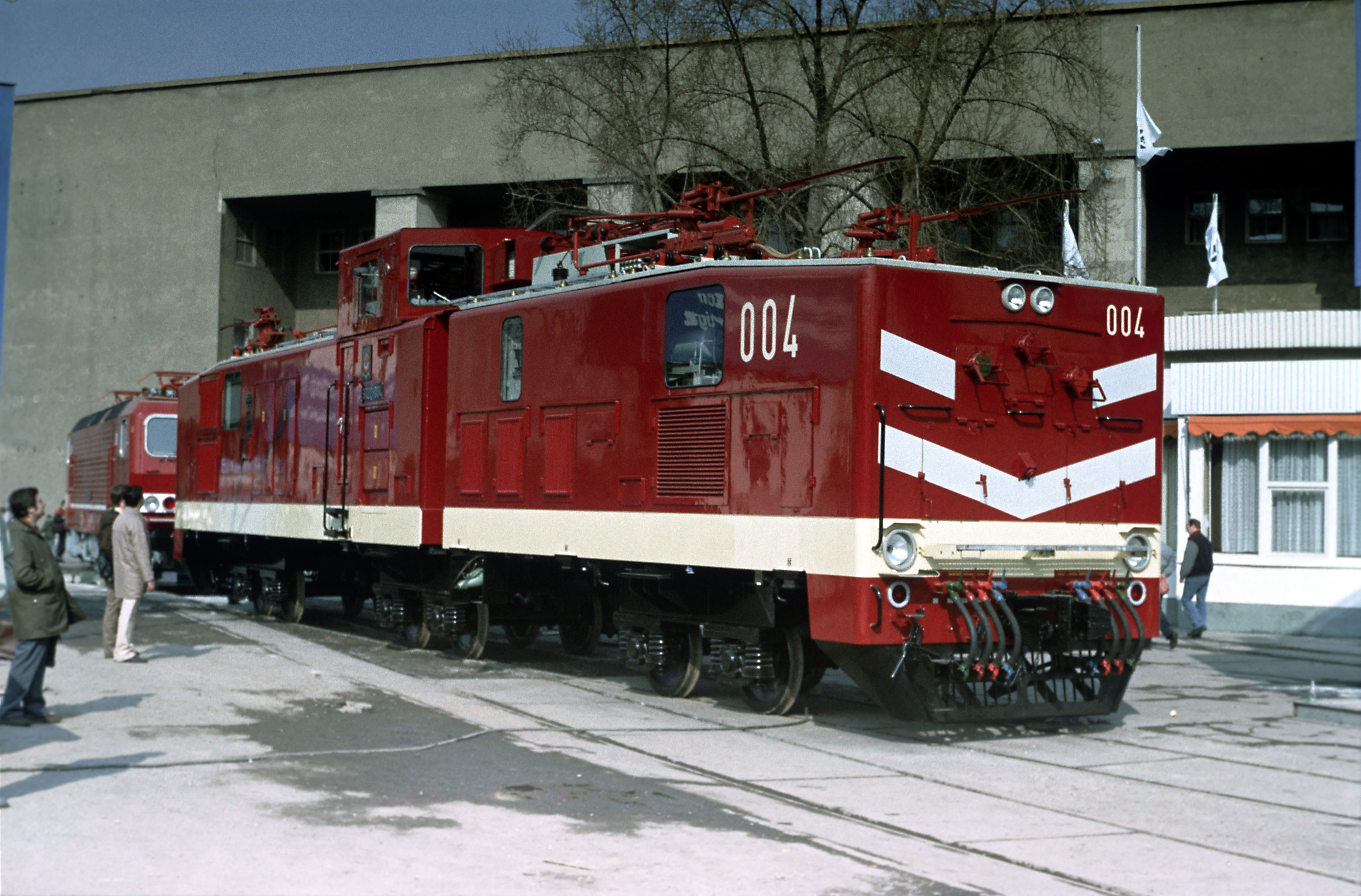 Eineinhalbsektionslokomotive für Bergbaubetriebe in der UdSSR auf Überführungsdrehgestellen